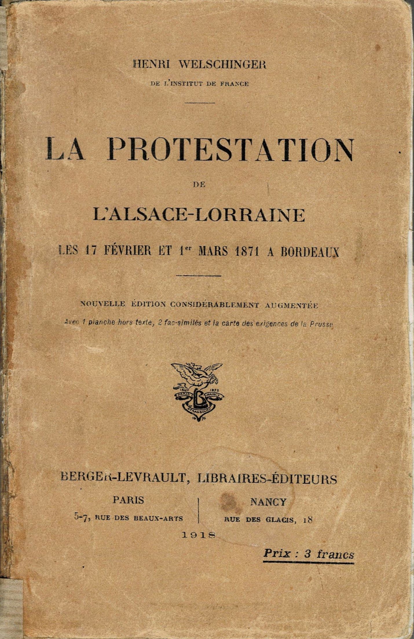 Couverture de l’ouvrage de Henri Welschinger, La Protestation de l'Alsace-Lorraine, les 17 février et 1er mars 1871 à Bordeaux, nouvelle édition considérablement augmentée, Paris & Nancy : chez Berger-Levrault, 1918